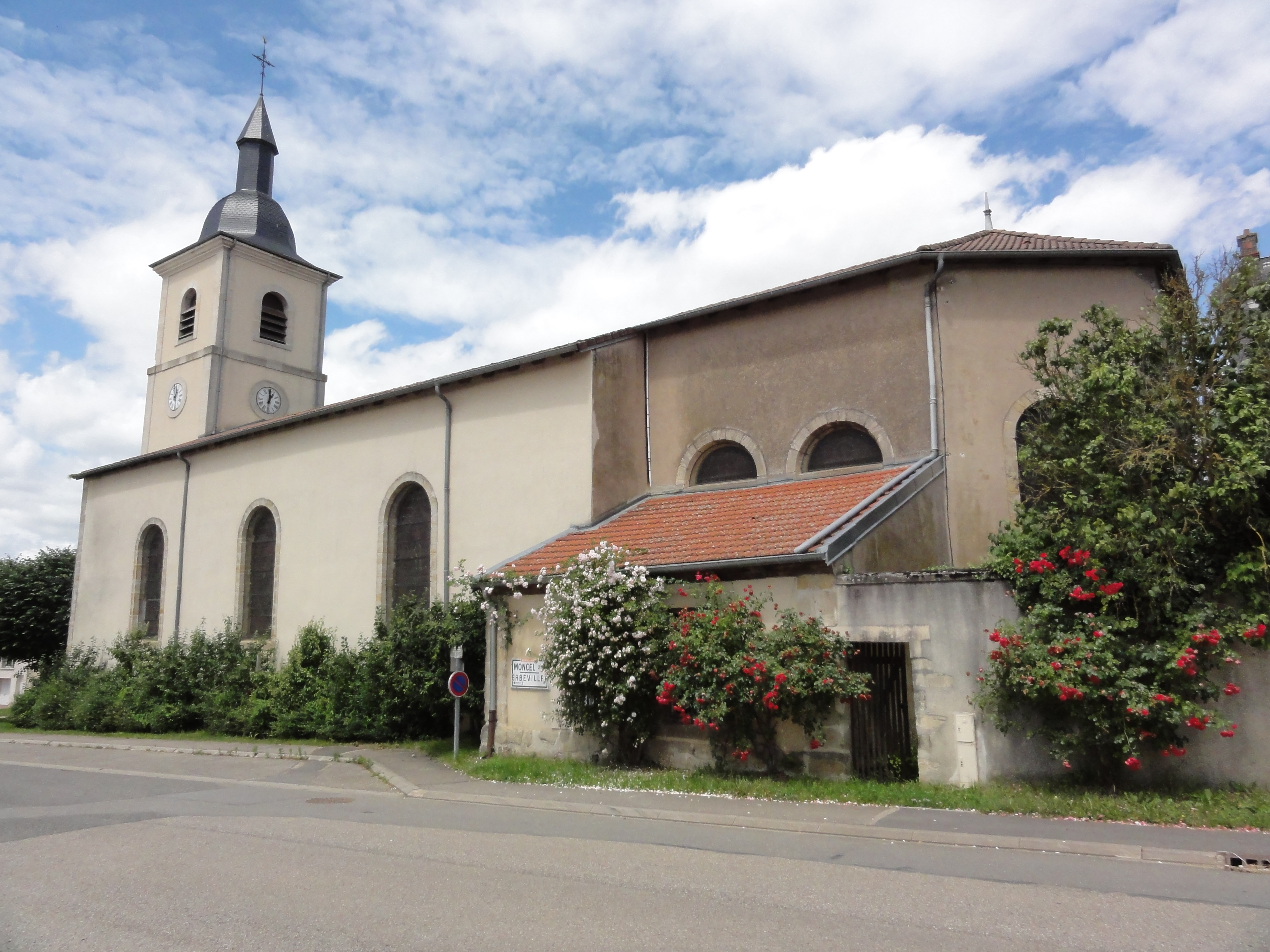 Sornéville (M-et-M) église